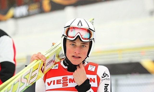 Pascal Egloff podczas serii treningowej przed konkursem indywidualnym mężczyzn na Mistrzostwach Świata w Narciarstwie Klasycznym 2011 w Oslo.